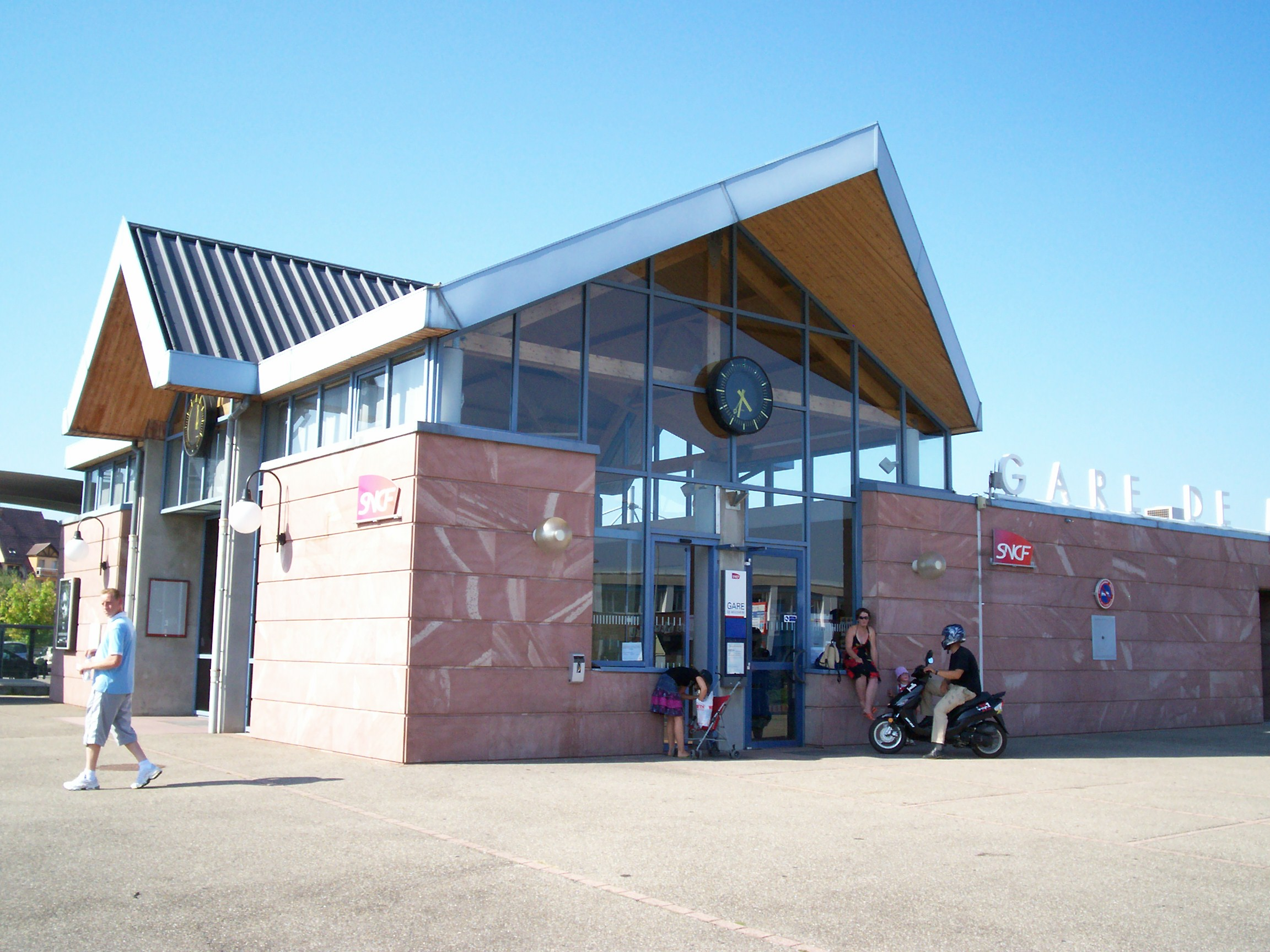 Bâtiment Voyageurs de Molsheim